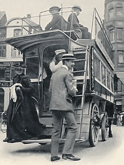 Hestetrukken omnibus på Strøget i København omkring år 1900. Horsedrawn omnibus on Strøget in Copenhagen around the year 1900 (photos are earlier than the published date of the book).